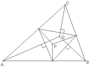 Description Constructie Q als isogonaal verwante van P Date13 January 2007SourceOwn workAuthorFvlamoen Constructie Q als isogonaal verwante van P